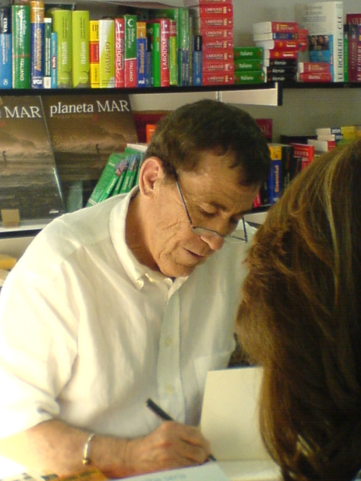 El escritor Fernando Sánchez Dragó firmando su último libro en la Feria del Libro de Madrid de 2007. Fotografía hecha con teléfono móvil.